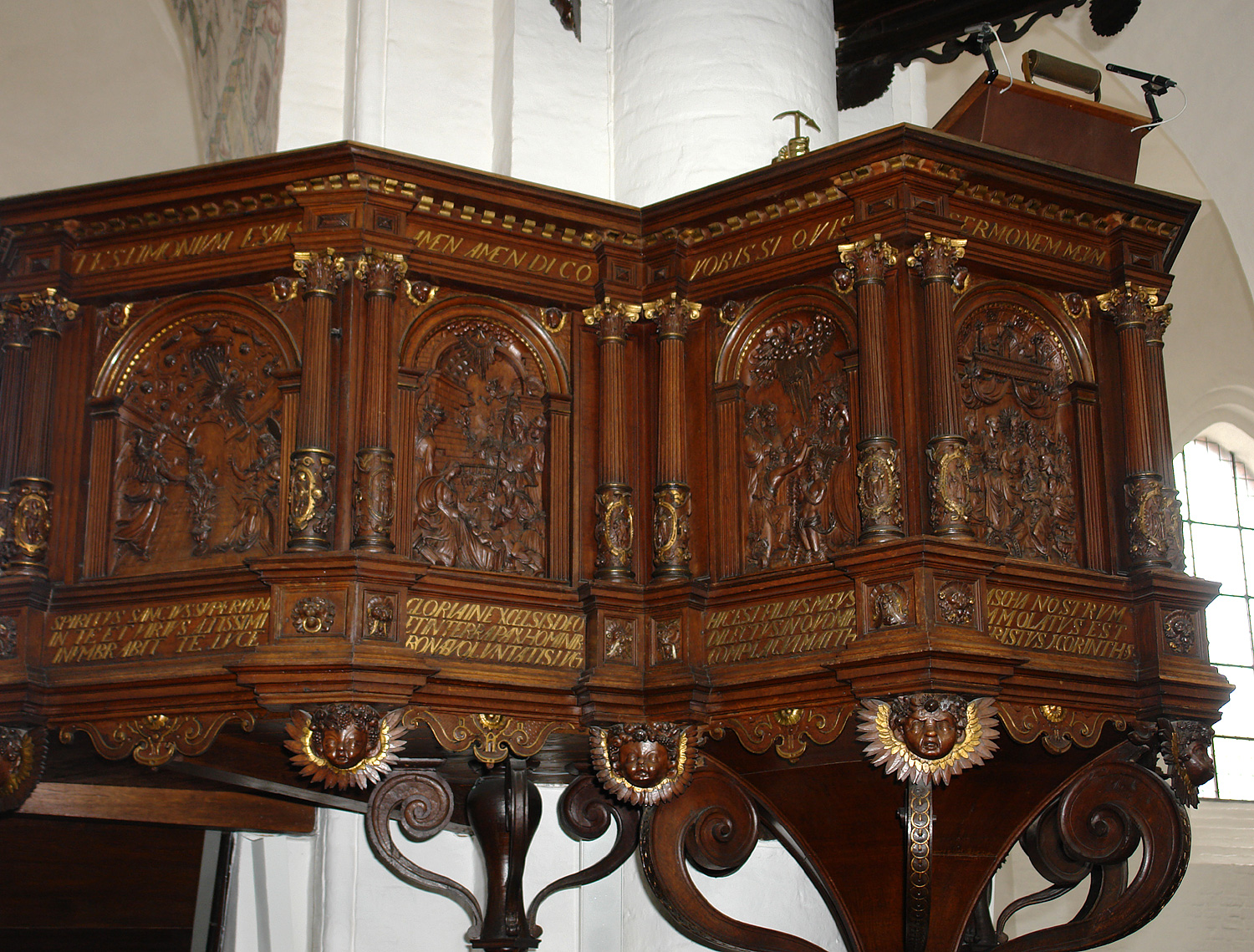 Dom zu Århus: Renaissance Kanzel aus Eiche von 1588. Erstellt von Michael van Groningen mit neun Motiven aus dem Alten- und Neuen Testament